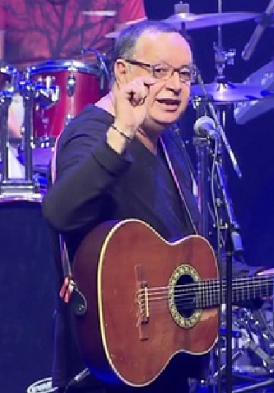 Walter Rosciano Franco (São Paulo, 6 de janeiro de 1945) é um cantor e compositor brasileiro.